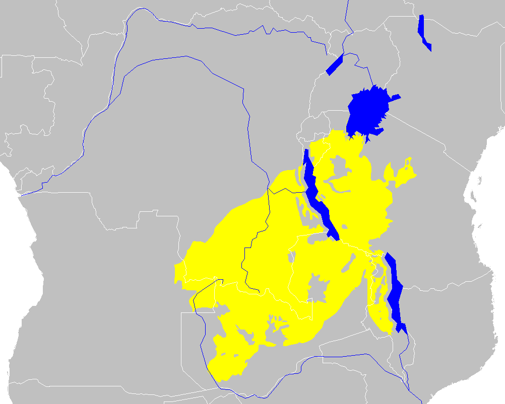 Central Zambezian Miombo woodlands ecoregion map